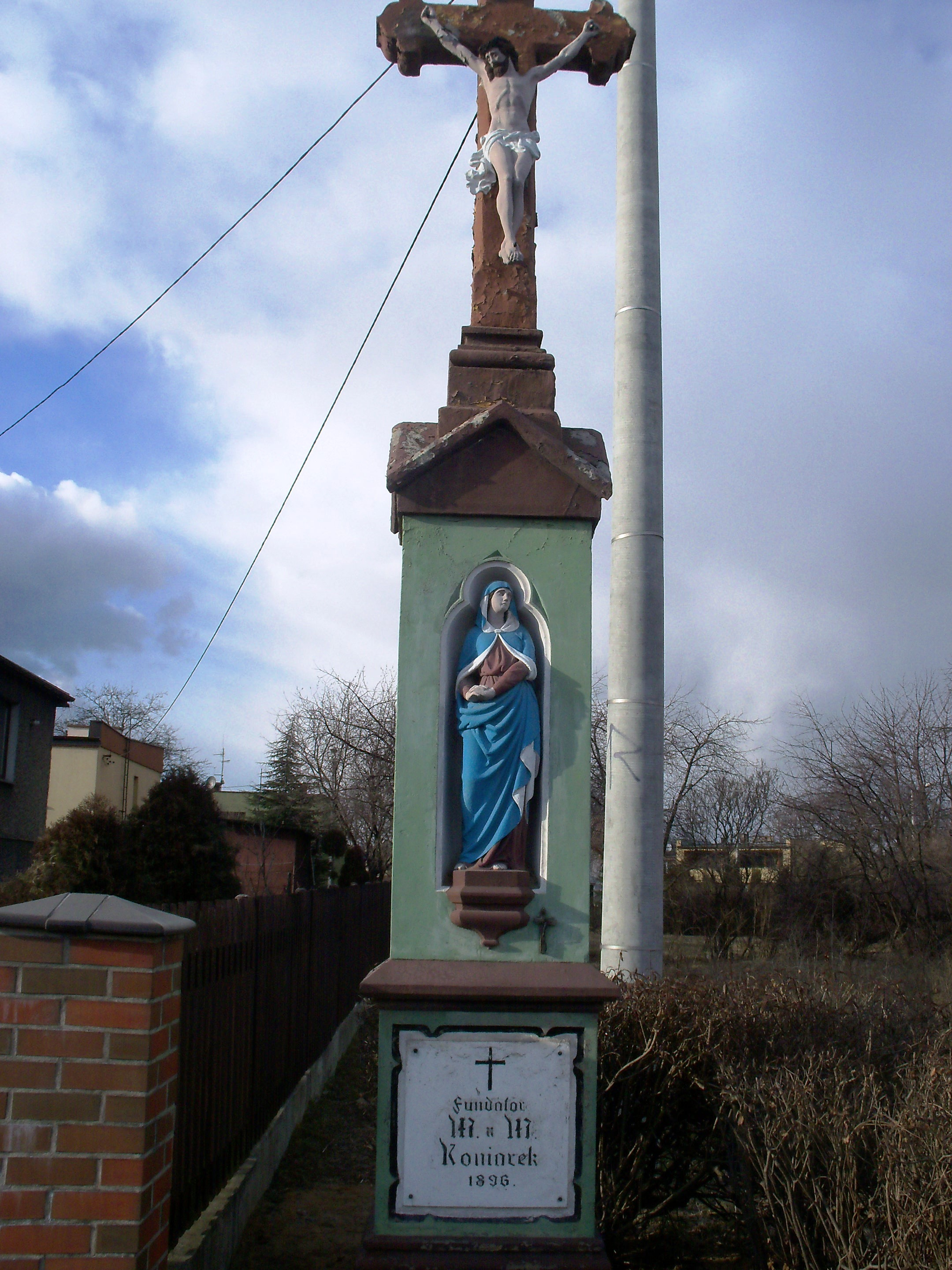 Krzyż przydrożny w Katowicach-Dąbrówce Małej, przy ul. gen. Henryka Le Ronda; krzyż z 1896 - ufundowany przez M. i M. Koniarek